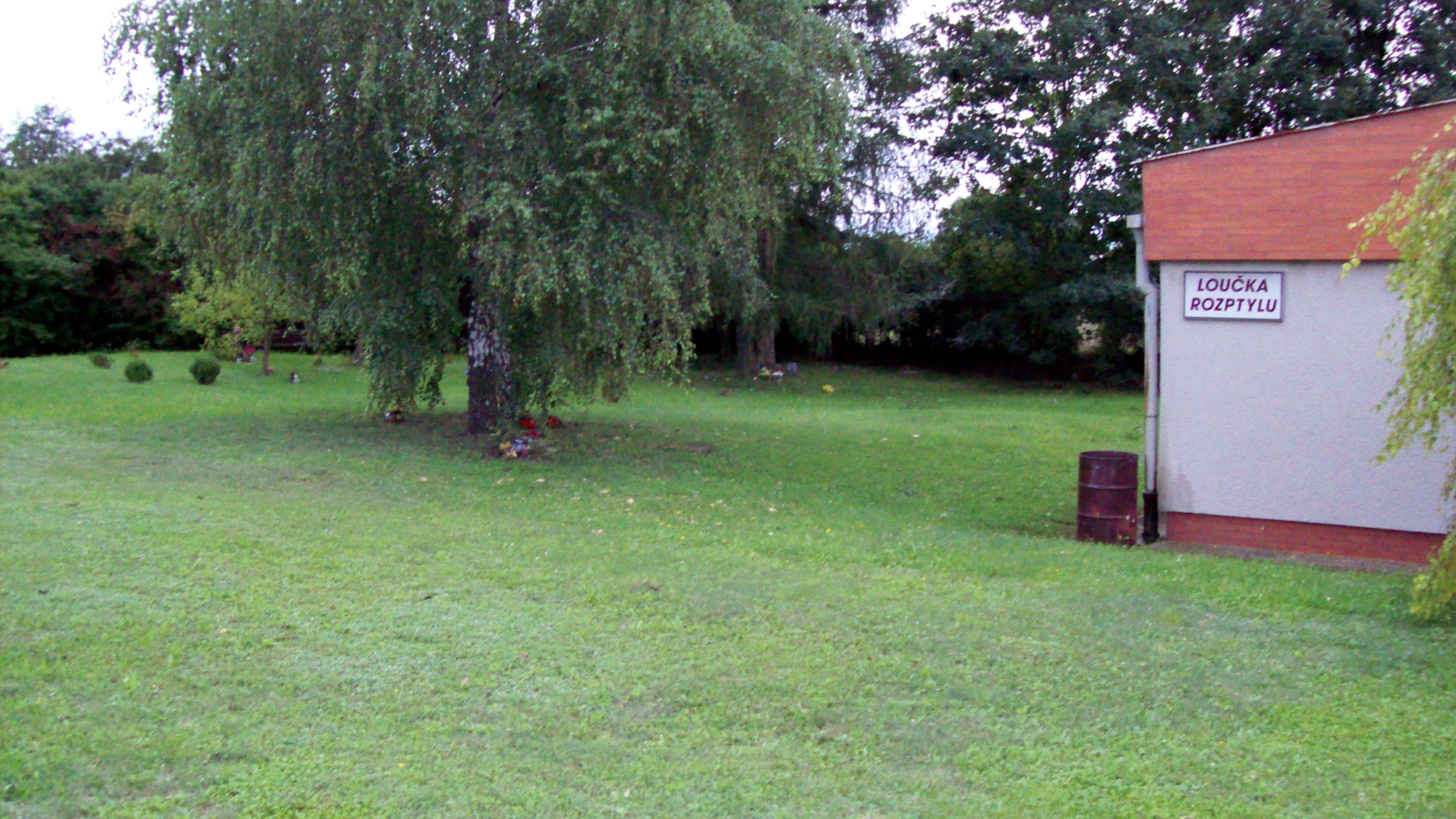 Loučka rozptylu, krematorium Mělník, v sousedství hřbitova Na Ráji.